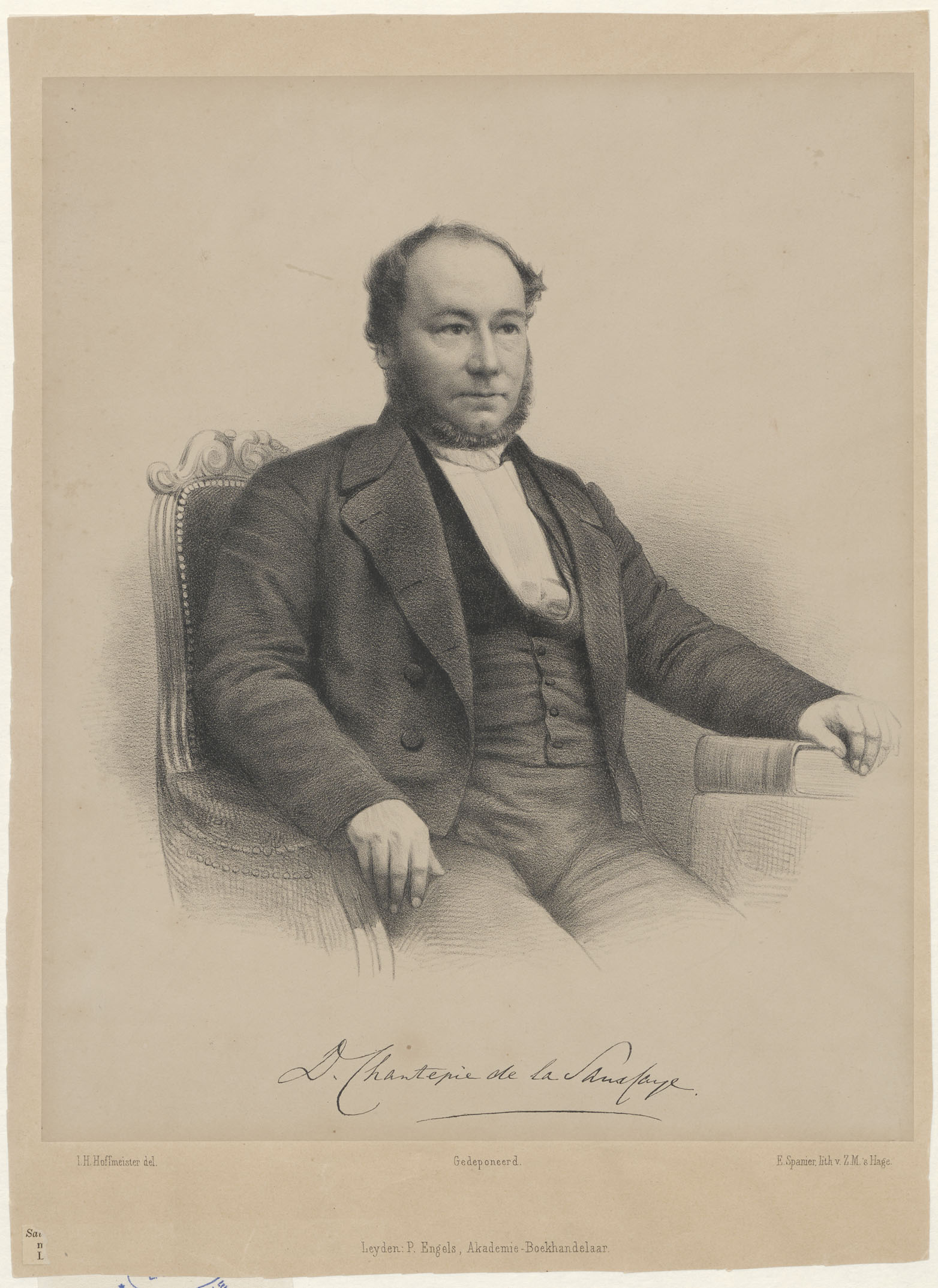 Portret van Daniël Chantepie de la Saussaye (1818-1874), Waals predikant te Leeuwarden, Leiden. Ontwerper: J.H. Hoffmeister. Litho: E. Spanier. Uitgever: P. Engels